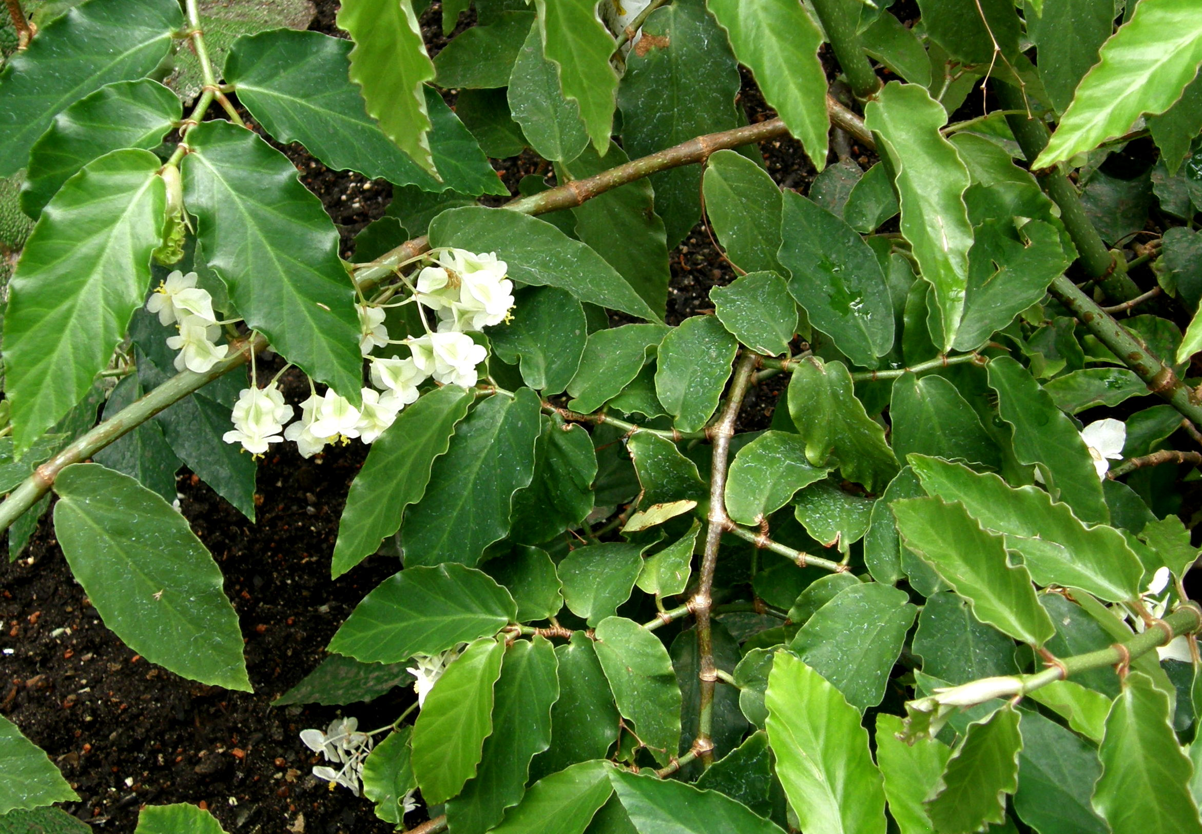 Begonia undulata Schott en fleur dans la serre du Botanischer Garten de Berlin-Dahlem